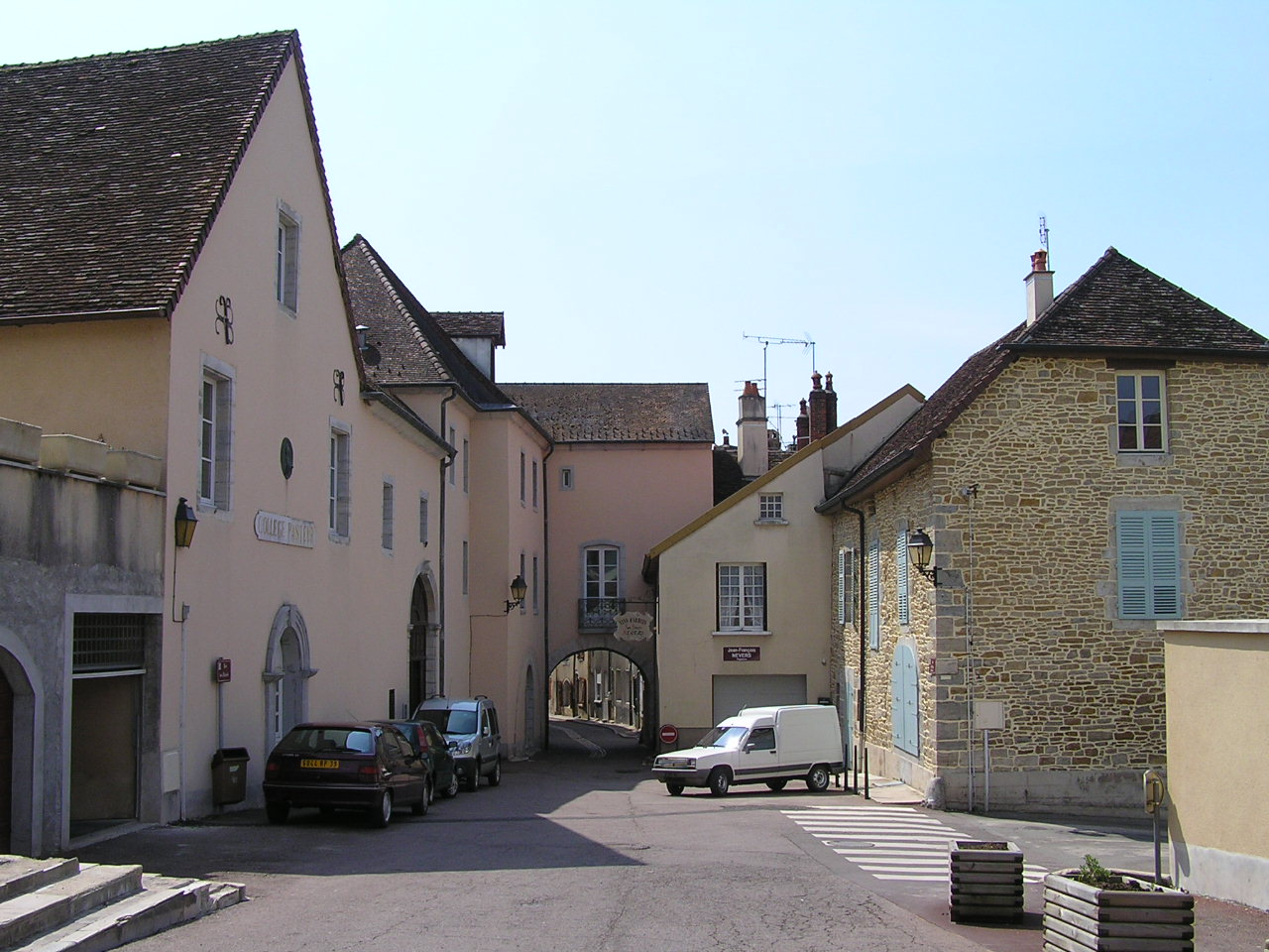 Rue du Château Pécauld à Arbois, Jura, France. Photo by Damien Boilley, April 19th, 2006. Source: Flickr.